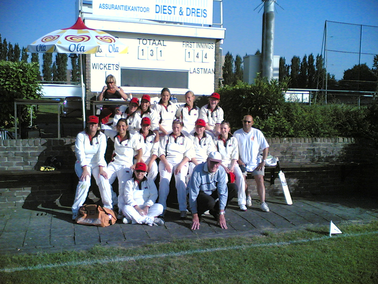 Quick 1888 dames cricket, na de gewonnen wedstrijd tegen V.O.C. 1. Achteraf bleek dat VOC alleen deze wedstrijd zou verliezen in het seizoen 2006. De club uit Rotterdam werd kampioen van de 1e klasse. Zittend op de onderste rij, tweede van links is Lotte Egging, Quicks international. Lotte speelde met het Nederlands elftal mee in de reeks om het Europees kamioenschap.